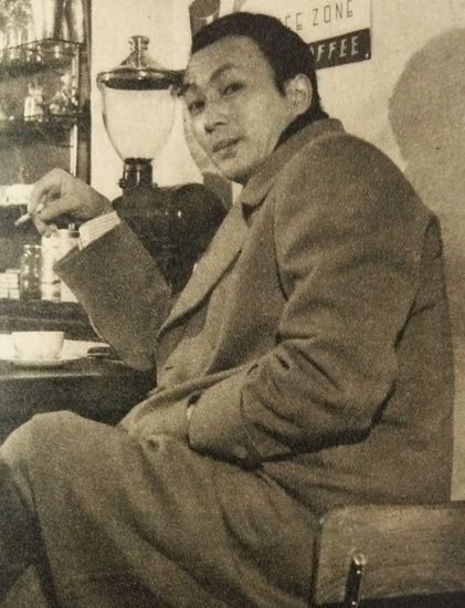 若原雅夫（俳優、「カルメン純情す」「われ泣きぬれて」など主演作多数）